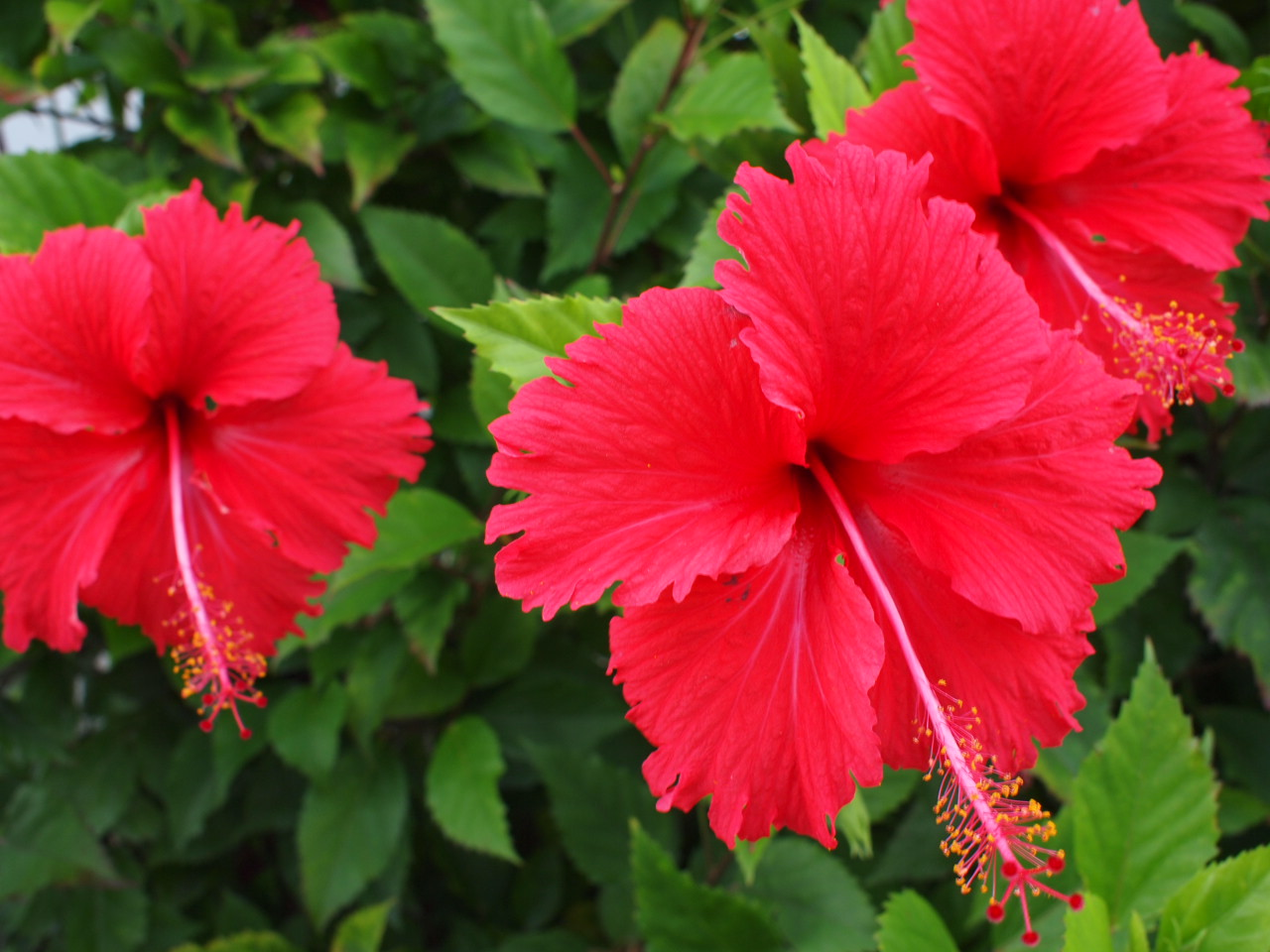 鹿児島県西之表市に咲くブッソウゲ